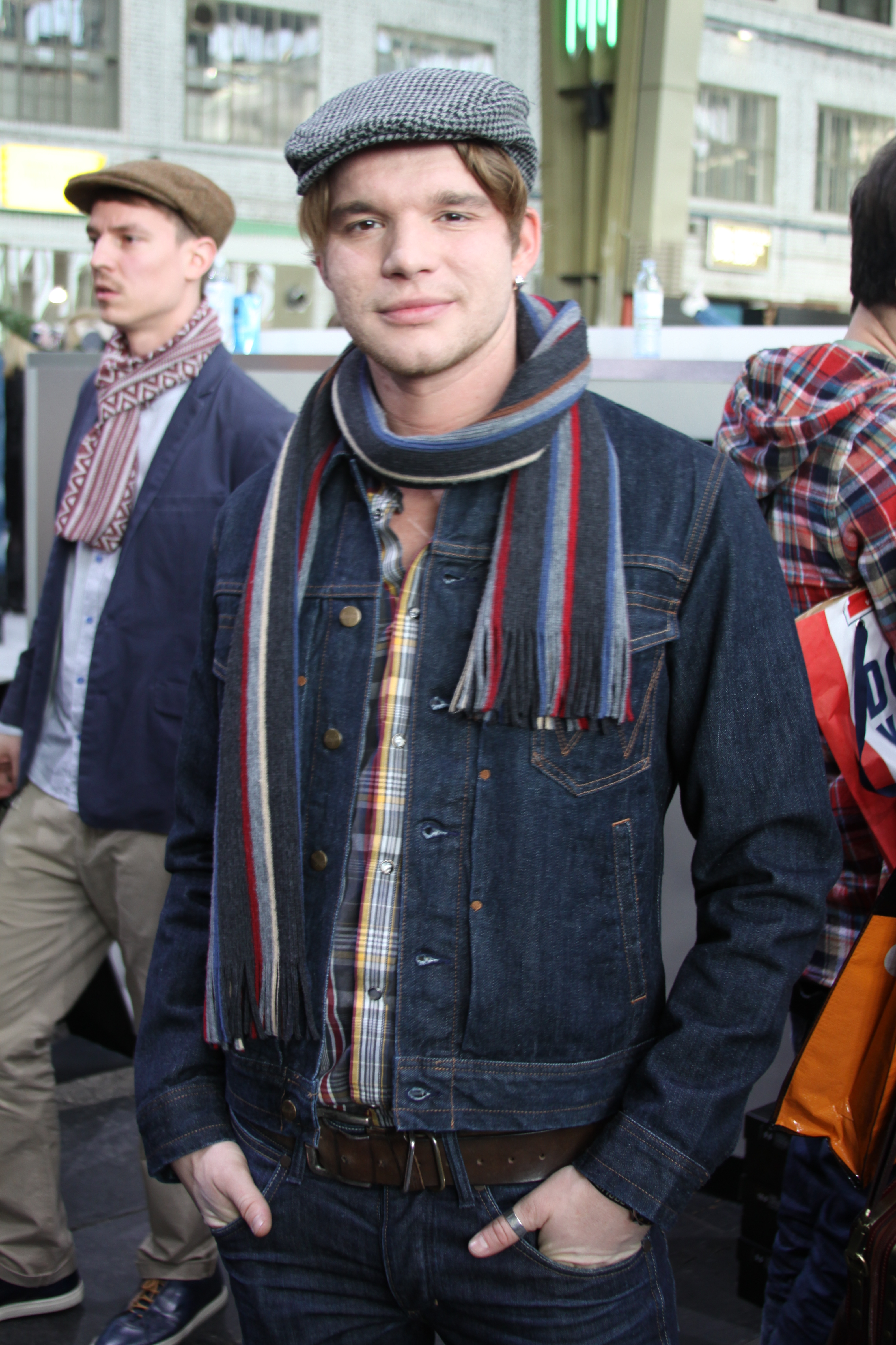 Tobias Schenke auf der Bread & Butter Messe in Berlin am 19.1.2011